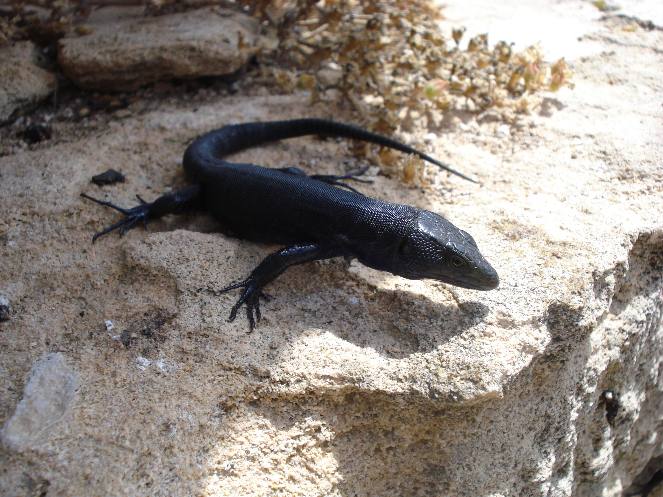 exemplar de sargantana (podarcis lilfordi jordansi), a l'illa de Na Moltona